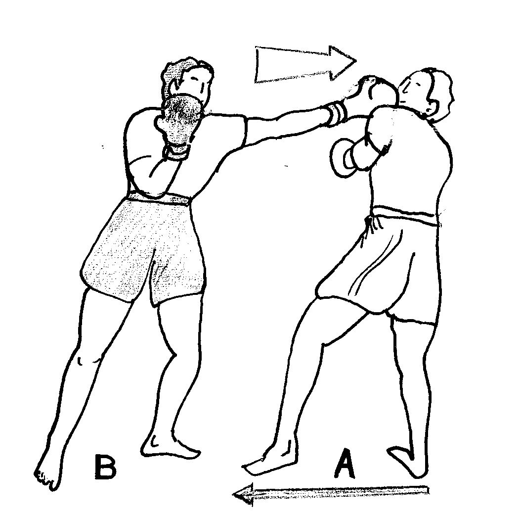 jab4.jpg